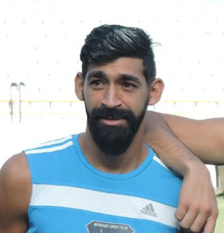 Entrenando